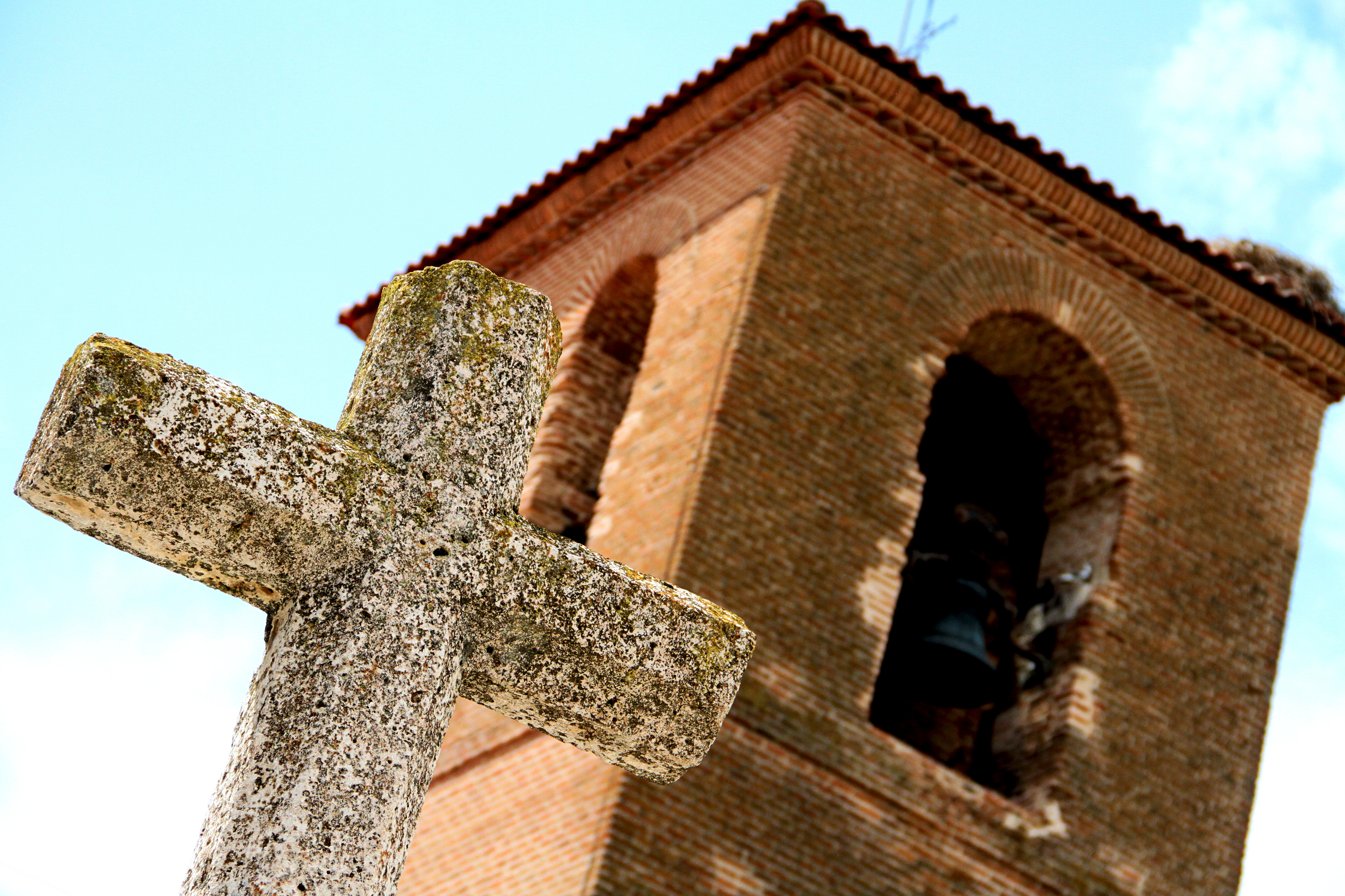 Detalle de la Torre de la Iglesia y Cruz de Pozal de Gallina, por Jose Maria Rodriguez Martin, "Chefo"